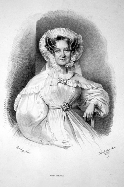 Adelheid Andrassy geb Szapary (1798-1876), Gräfin